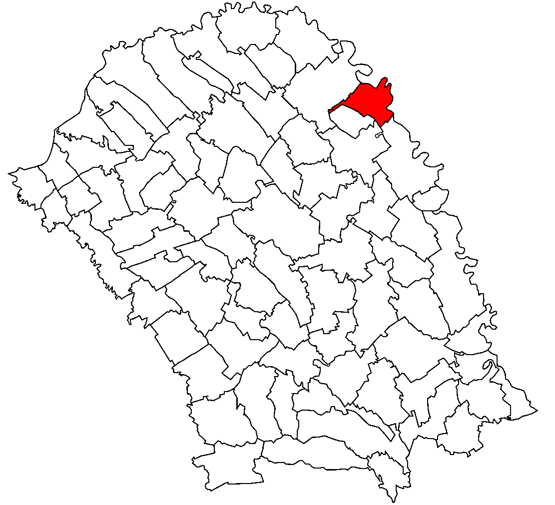 Categorie:Hărţi ale judeţului Botoşani